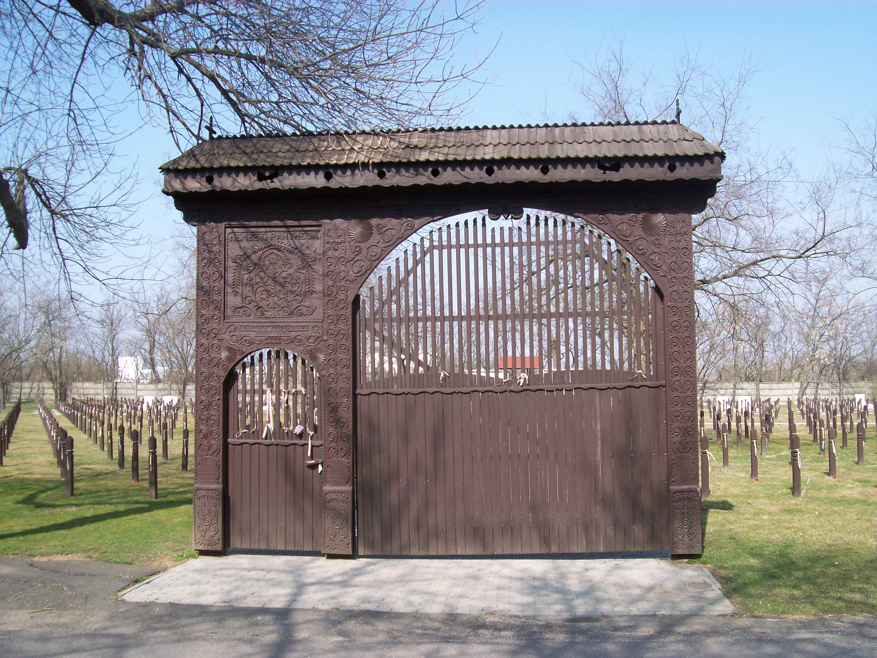 A 298-as parcellában álló székelykapu (Budapest, Kőbánya, Újköztemető)